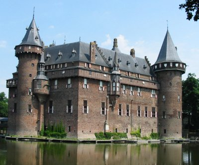 Kasteel de Haar, foto gemaakt en ter beschikking gesteld voor vrij gebruik door Gebruiker:Ellywa